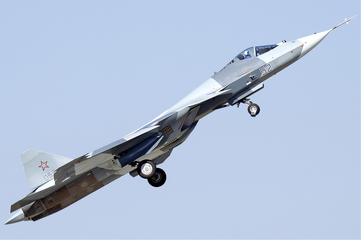 Sukhoi T-50 at MAKS 2011